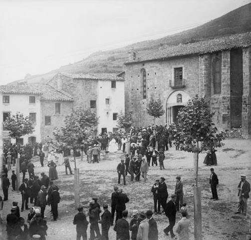 Imatge